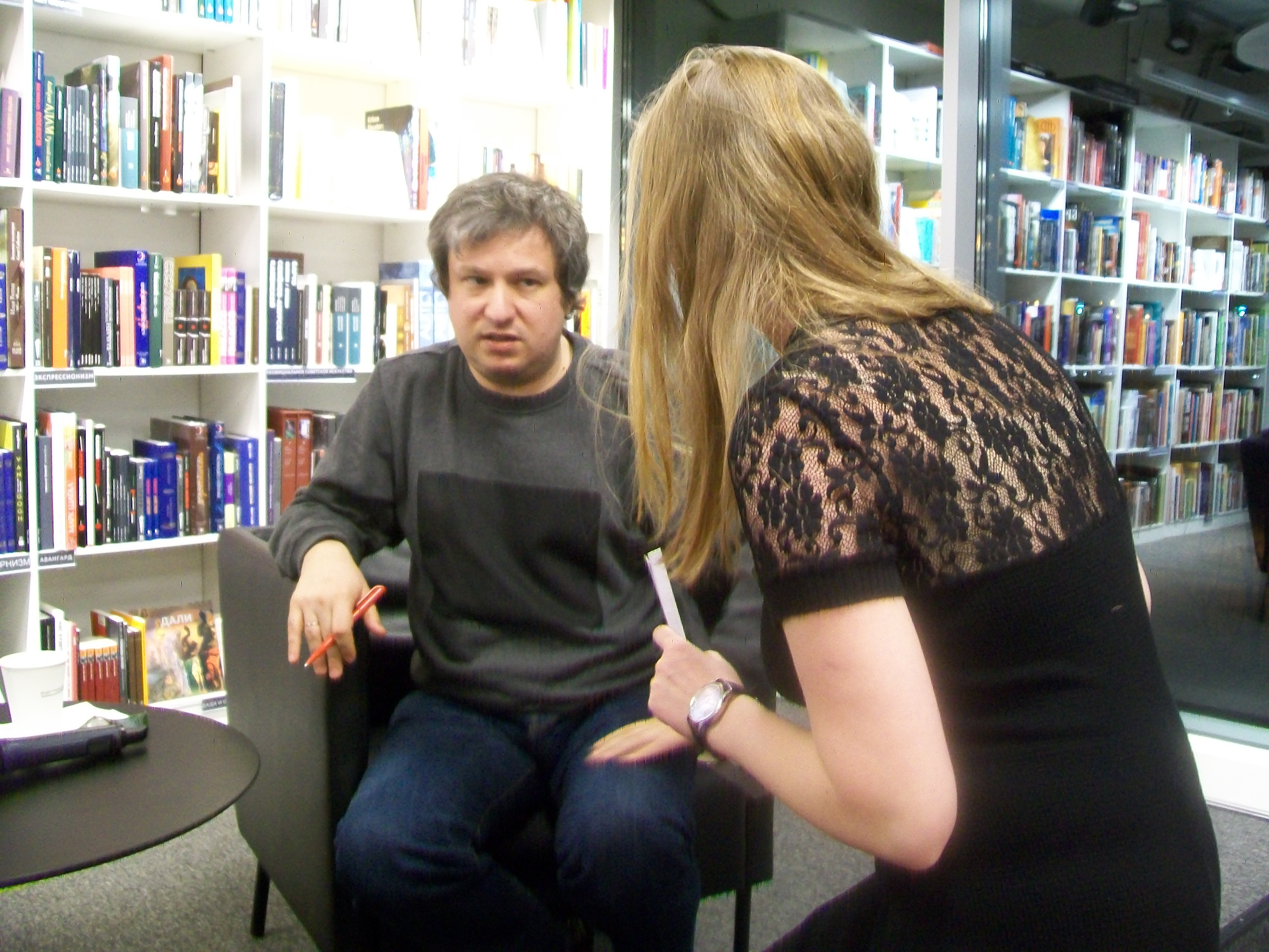 Антон Долин в Ельцин-центре на презентации своей книги о Джармуше. 12 марта 2017 года